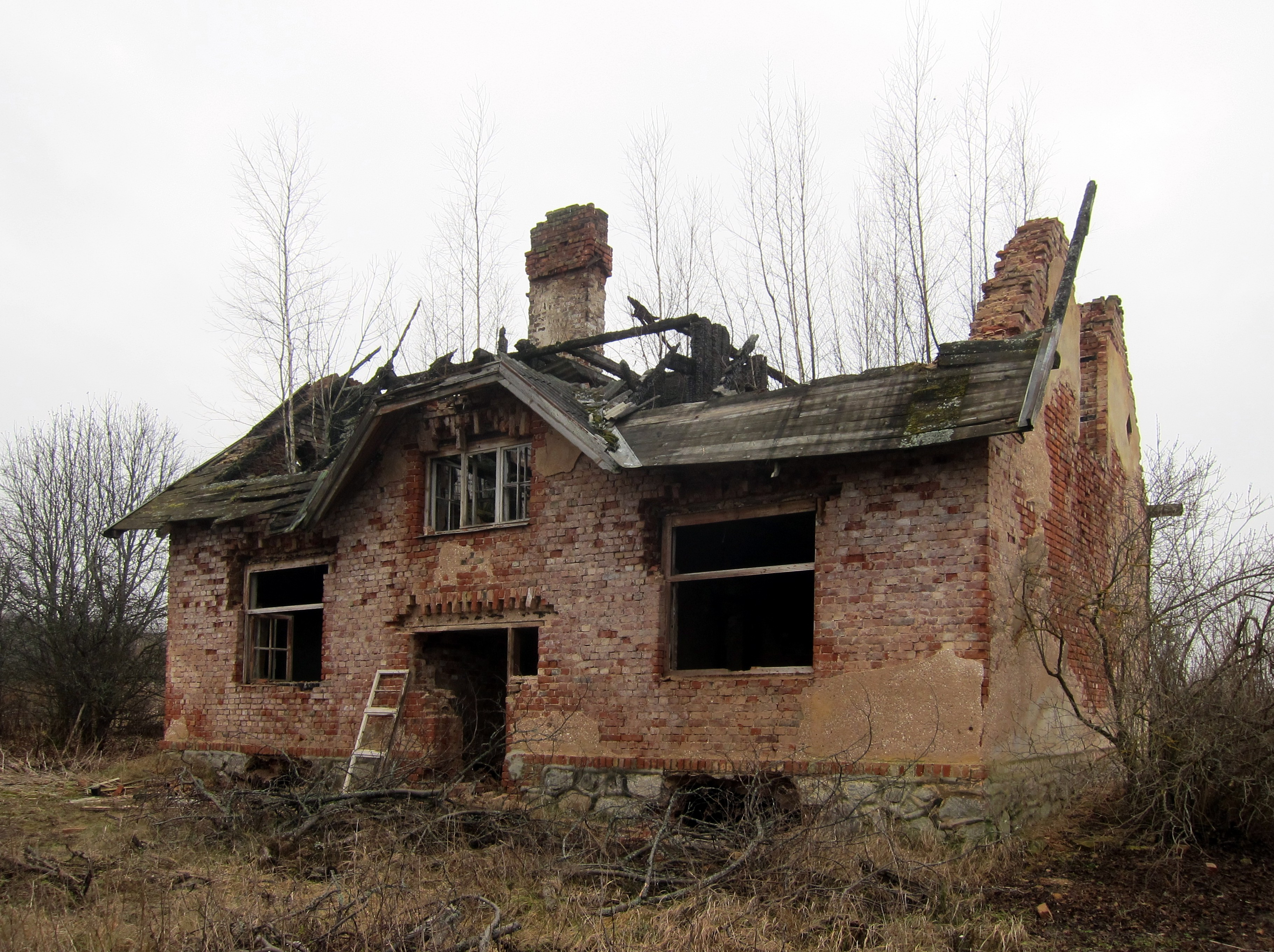 Galgauskas stacija